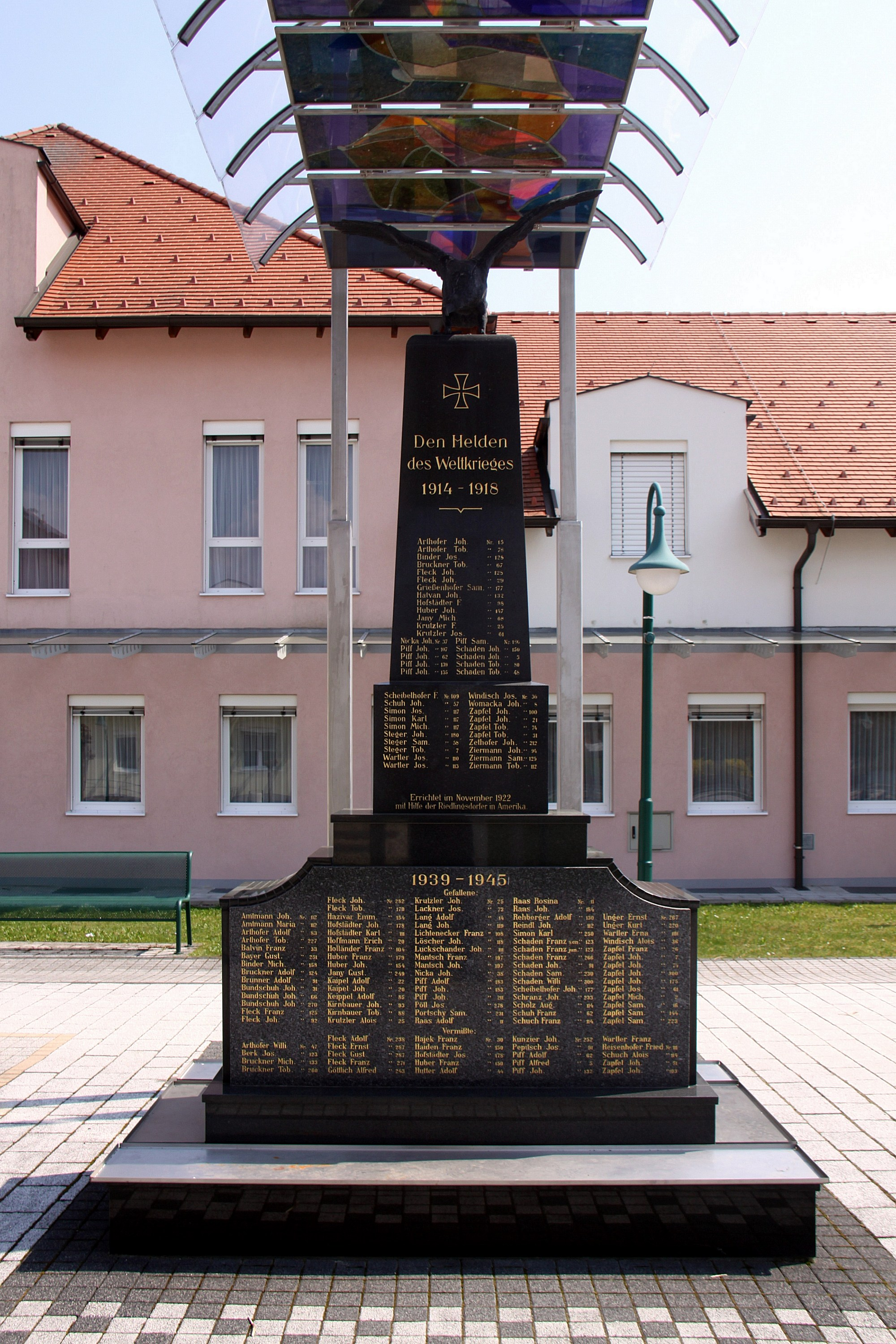 Riedlingsdorf - Kriegerdenkmal Object location47° 20′ 41.82″ N, 16° 08′ 10.27″ E